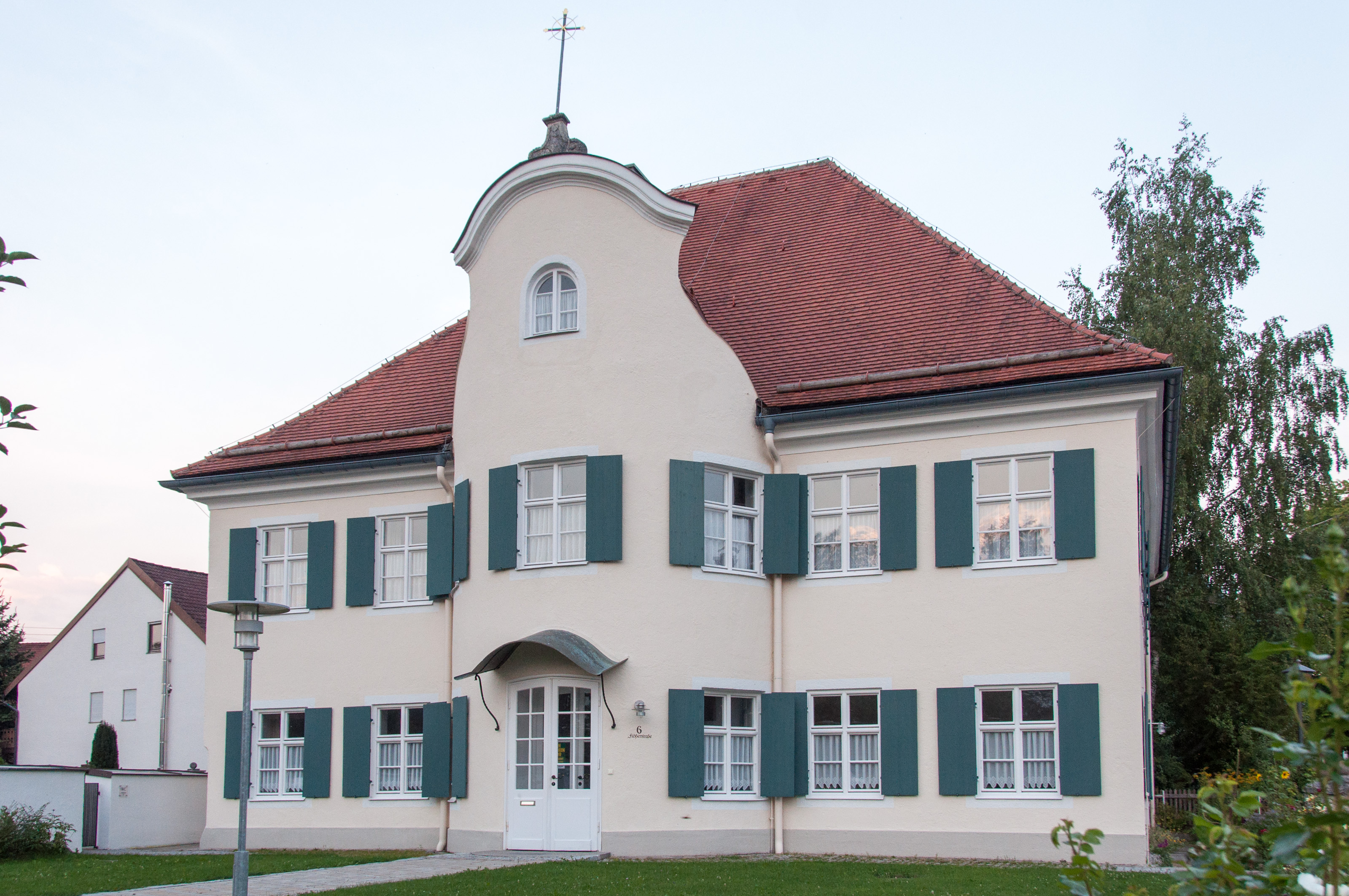 Pfarrhaus, zweigeschossiger Walmdachbau mit gerundetem, erhöhtem Vorbau, von Johann Michael Fischer, 1747-49.